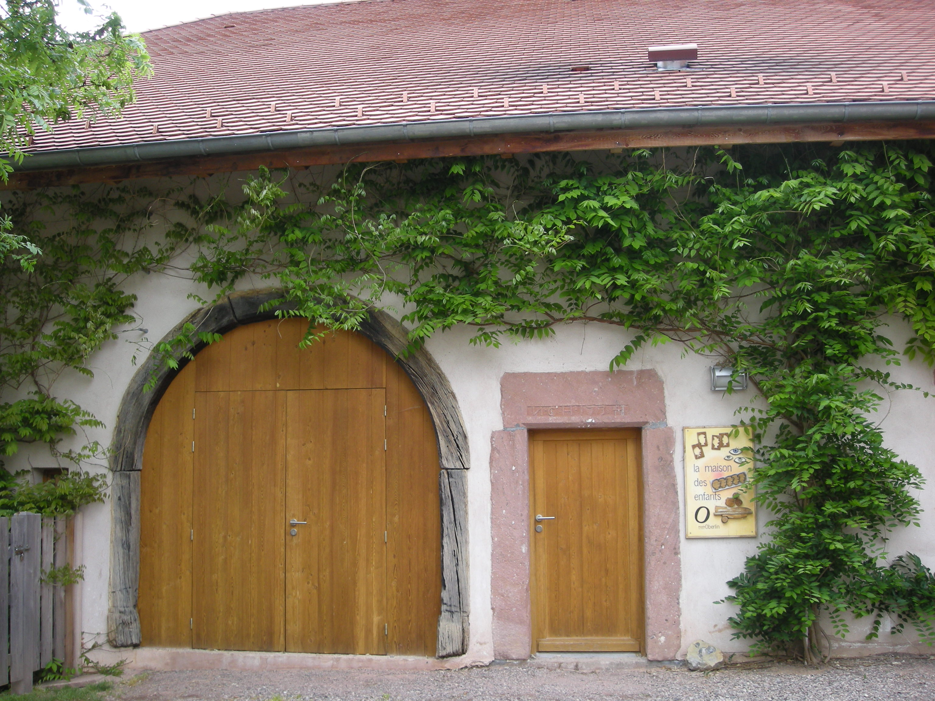 La Maison des enfants au musée Jean-Frédéric Oberlin de Waldersbach (Bas-Rhin). Elle a été reconstruite dans les années 1990 en intégrant quelques éléments d'origine (linteau de 1734)